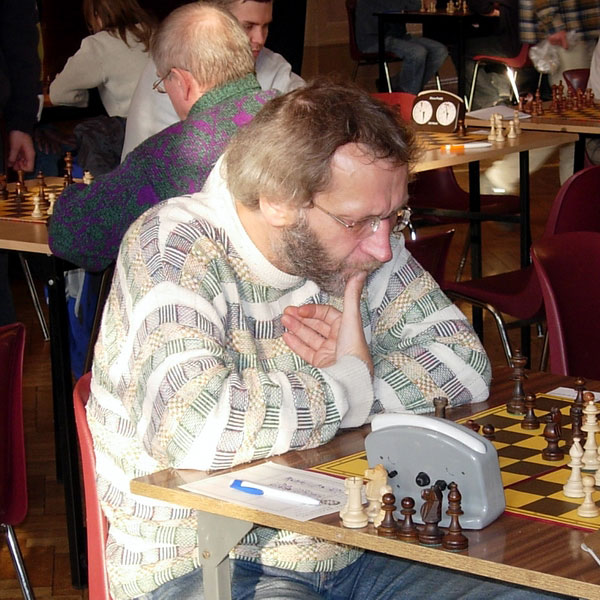 Krzysztof Żołnierowicz, Bydgoszcz 2006